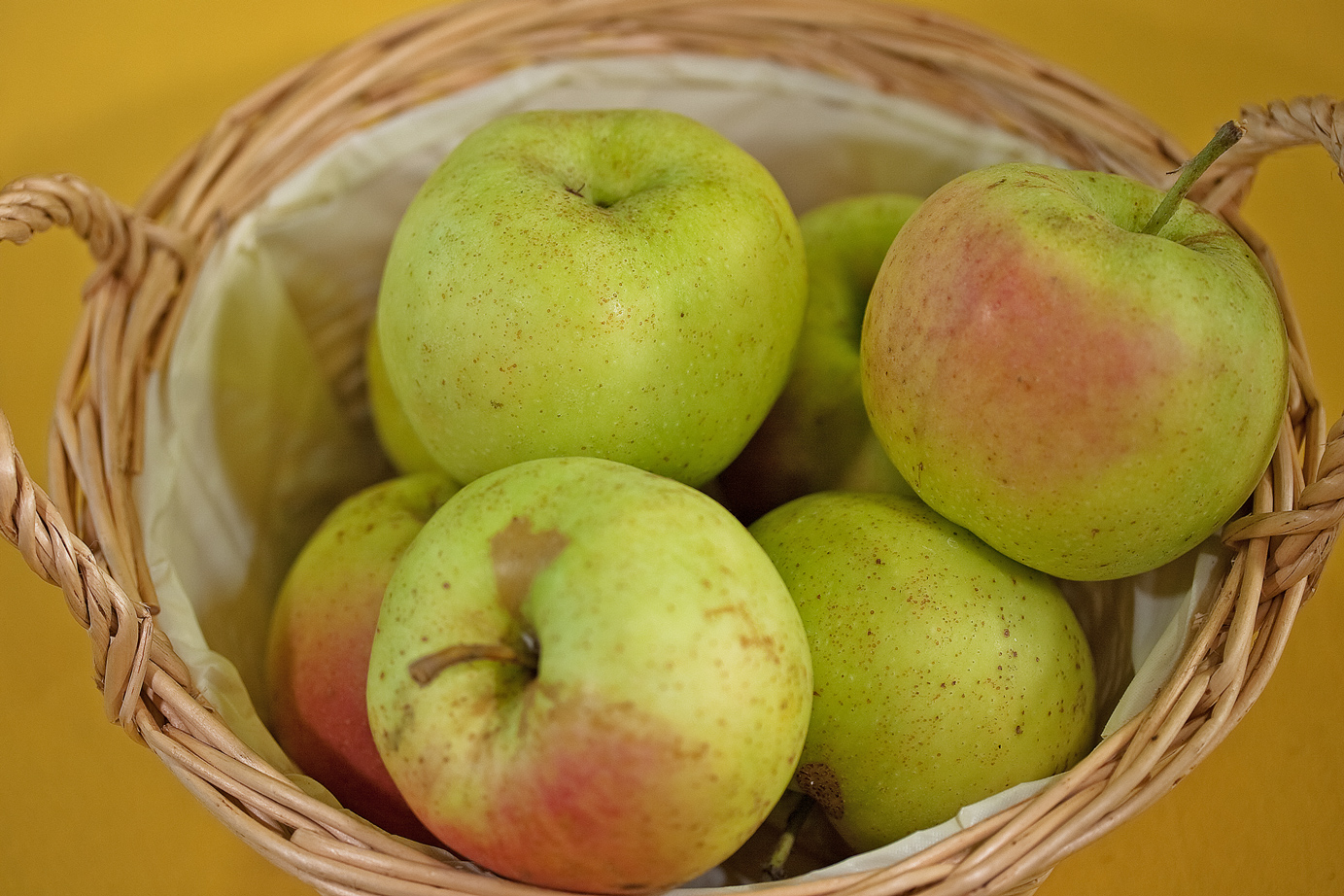 Der Winterbananenapfel ist eine alte nordamerikanische Sorte (1876). Als Wirtschaftsapfel ist er für die Dauerlagerung geeignet. Nur in warmen Lagen ist er als Tafelapfel ausgebildet. In Deutschland ist der Apfel eher selten im Streuobst zu finden.